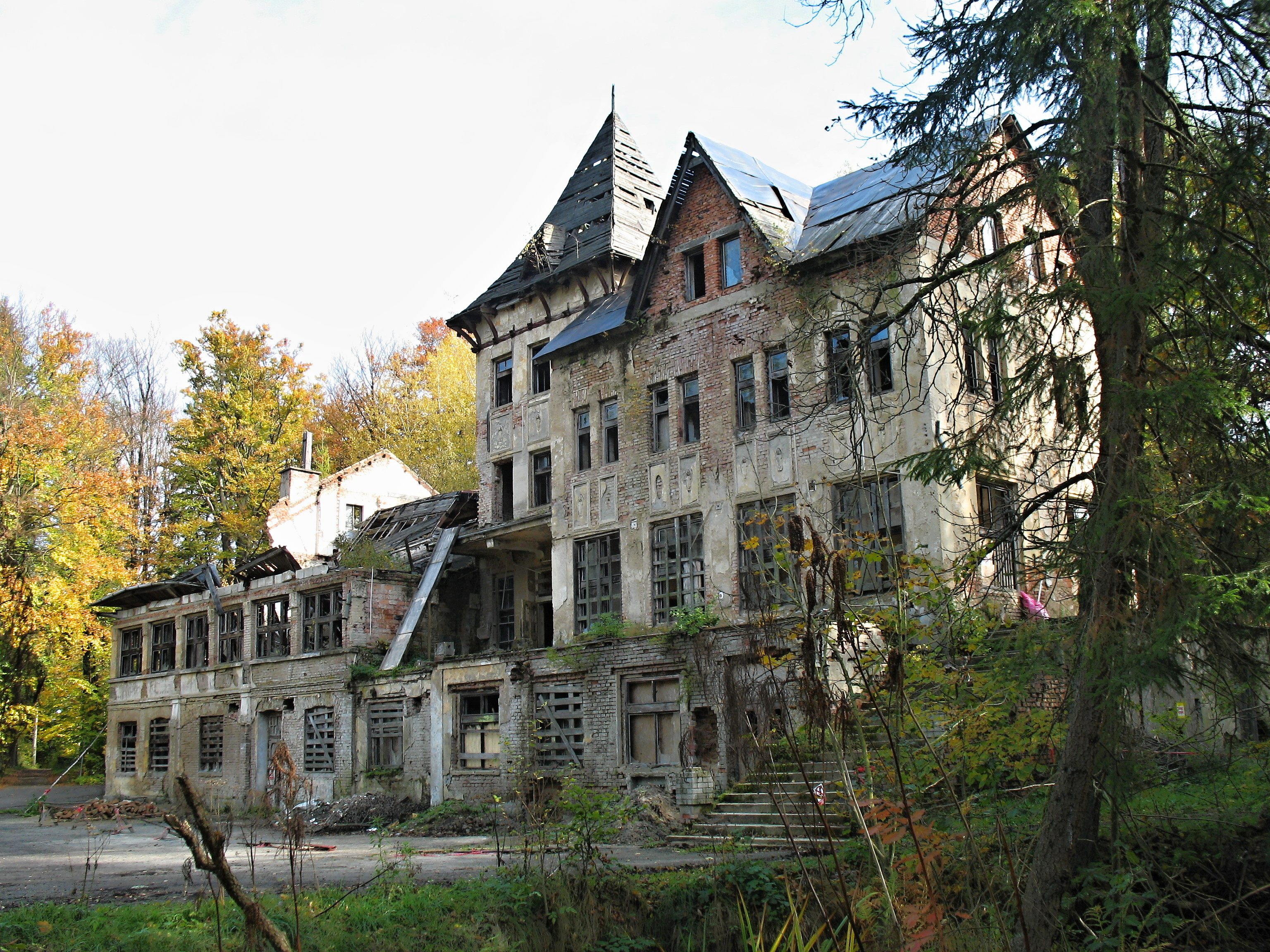 Budova bývalých slunečních lázní v Karlově údolí u Šluknova